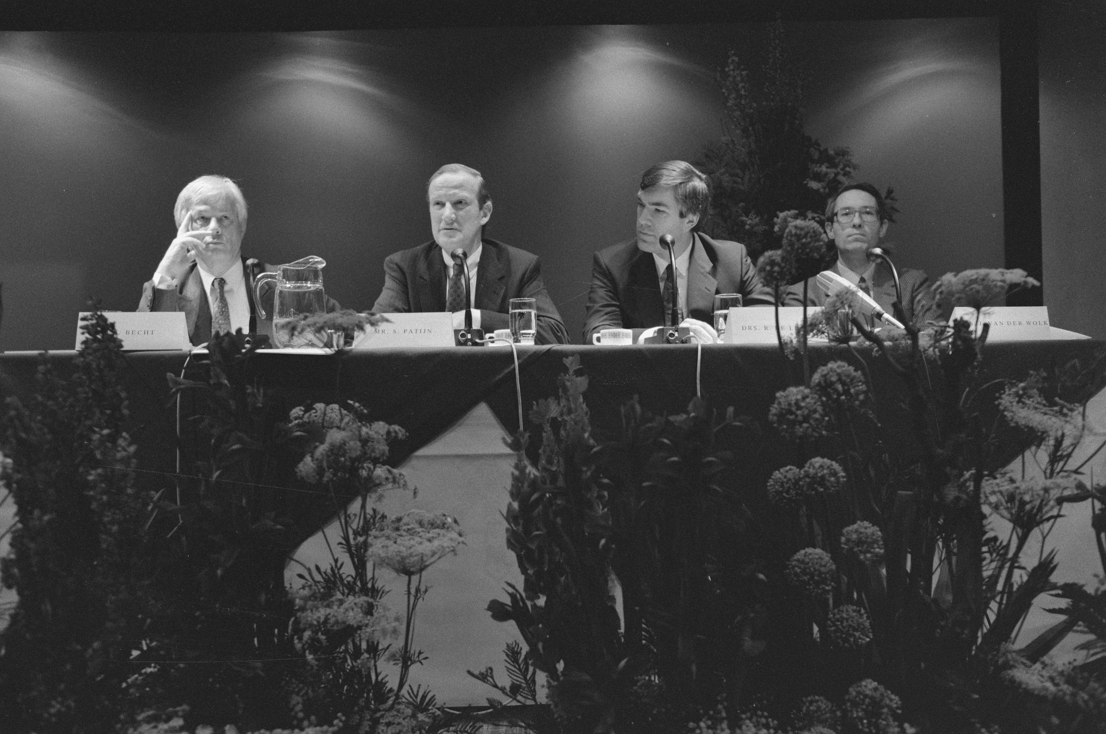 Persconferentie Stichting Van Gogh 1990. Van links naar rechts F.A. (Frits) Becht, mr. Schelto Patijn, drs. Ronald de Leeuw en Frits van der Wolk. Etten-Leur, 25 januari 1989